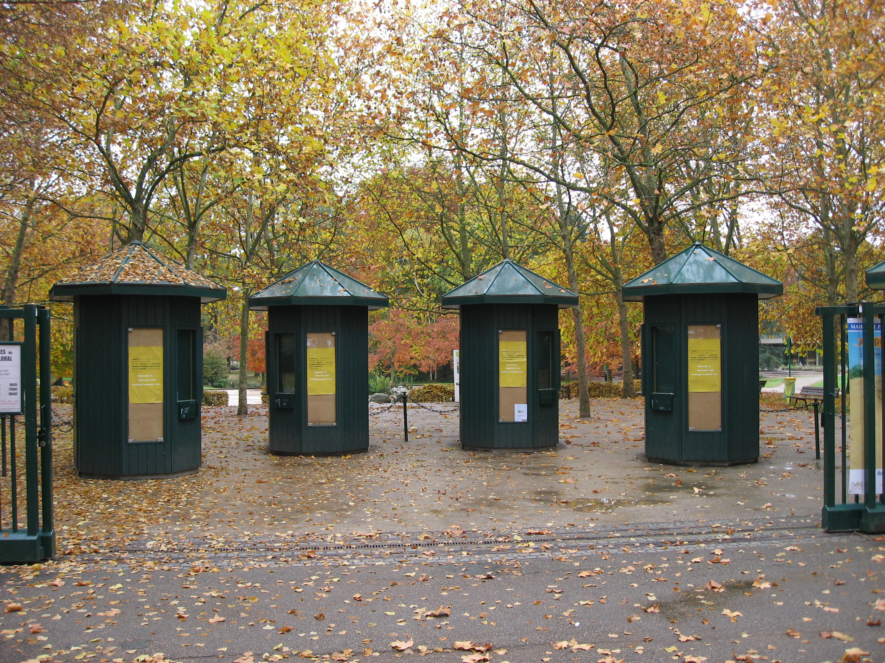 Entréé du Parc floral de Paris Map: 48° 50' 19" N 2° 26' 33" E